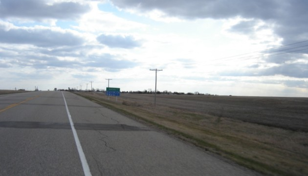 Saskatoon to Delisle SK Hwy 7